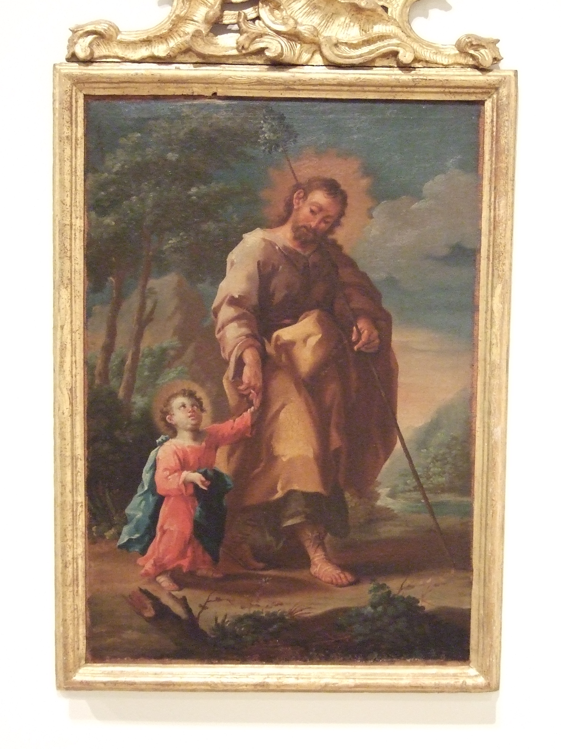 La obra representa a San José junto a su hijo, el Niño Jesús.